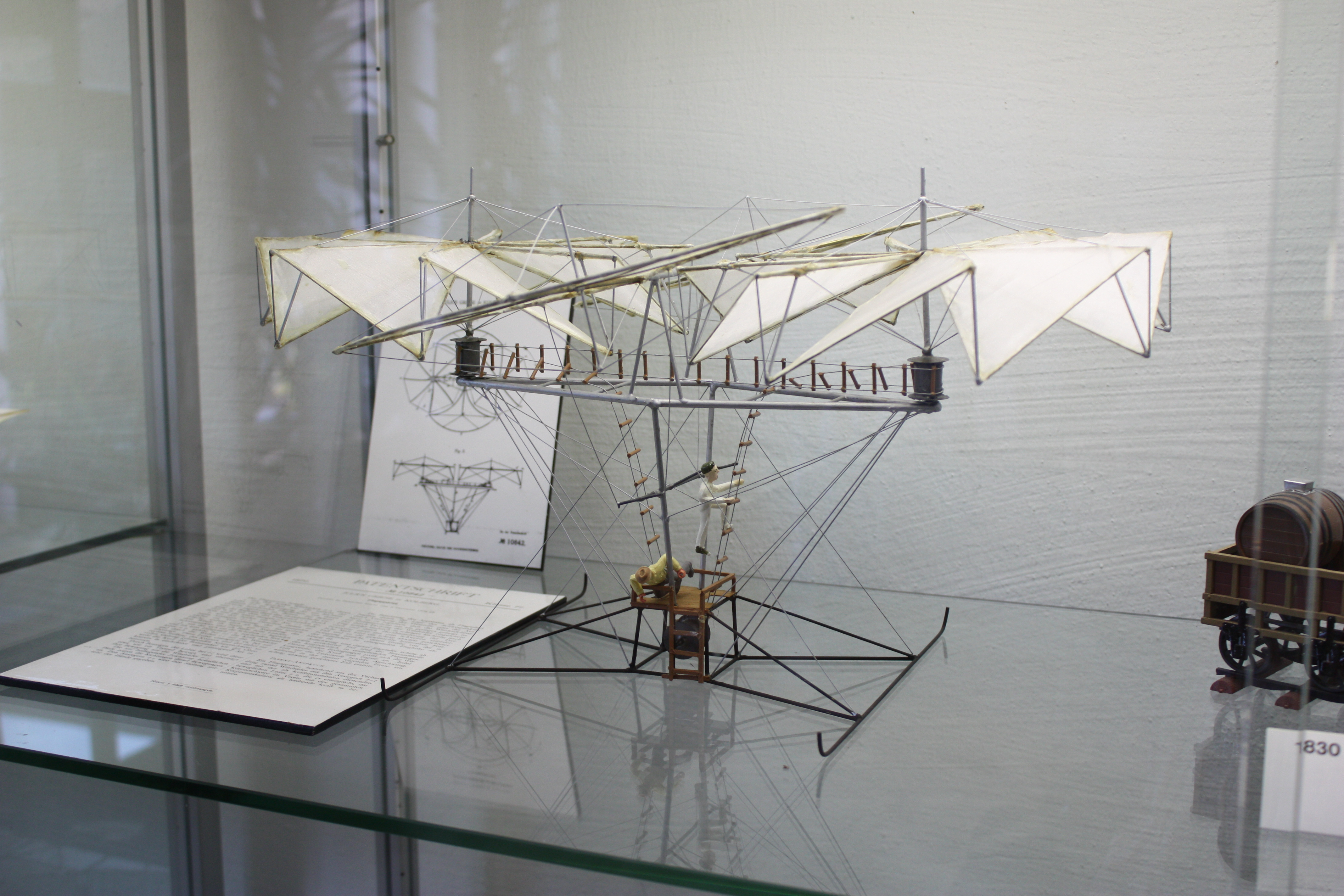 Hubschraubermuseum Bückeburg; dazugehörige Beschreibung - File:Hubschraubermuseum Bückeburg 2010 0024.JPG - und Zeichnung - File:Hubschraubermuseum Bückeburg 2010 0025.JPG